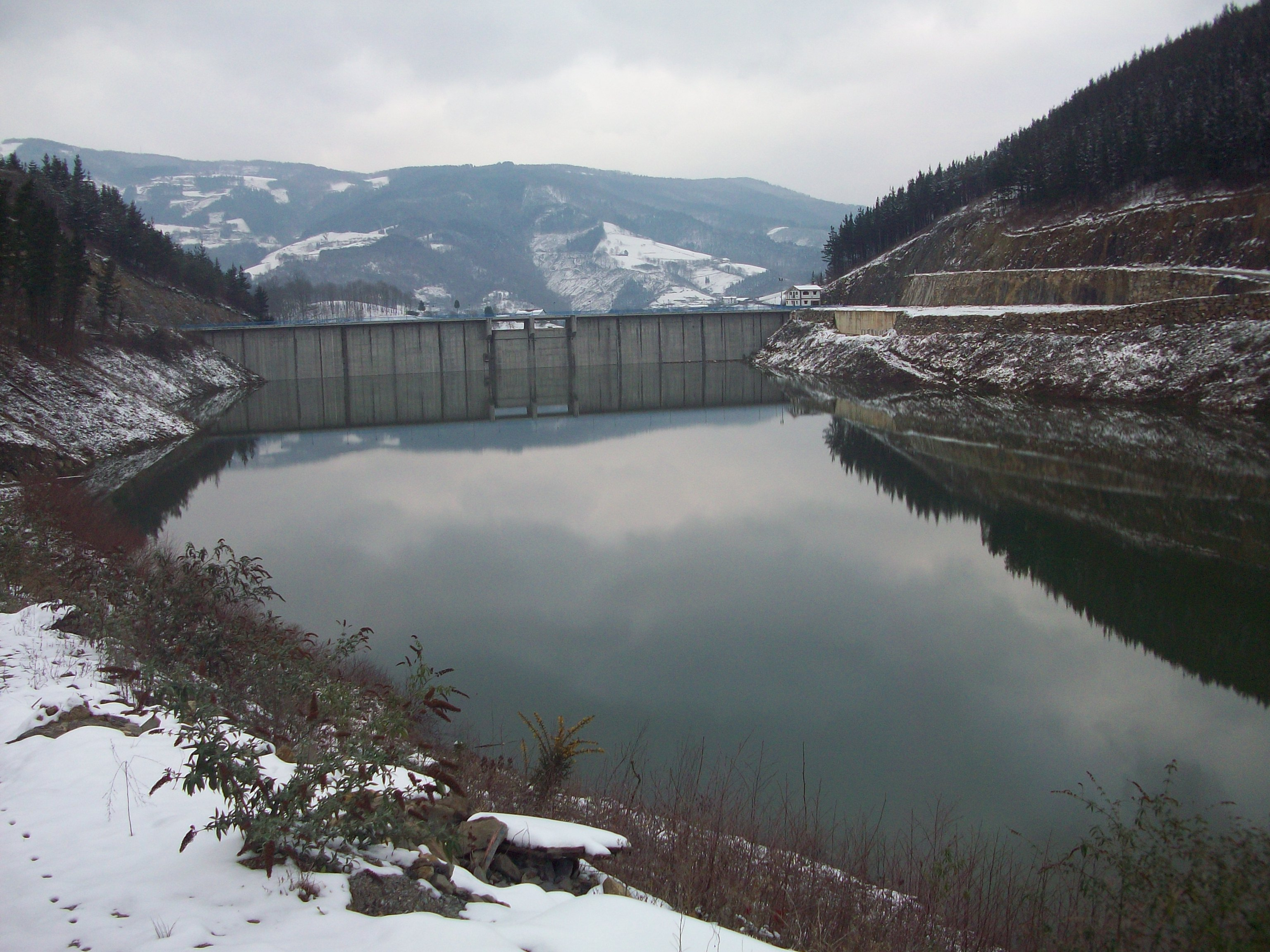 Baliarrain udalerriko Ibiur urtegia. Gipuzkoa, Euskal Herria. Ibiur dam in Baliarrain village. Gipuzkoa, Basque Country.